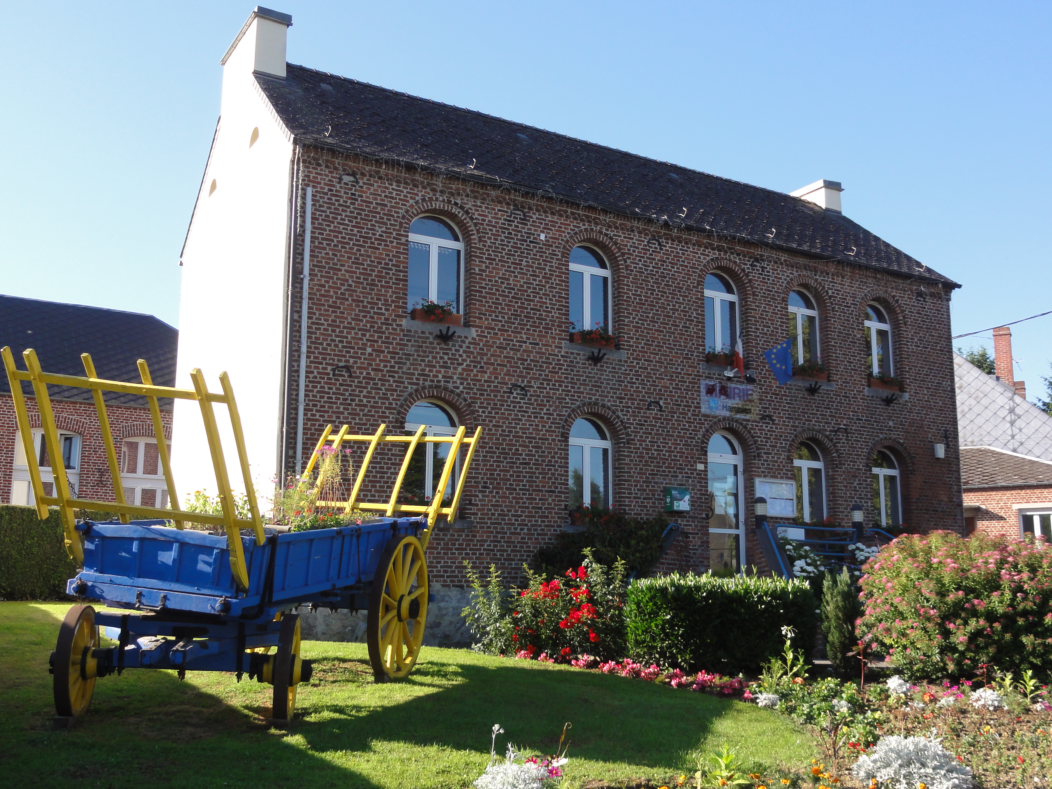 Hargnies (Nord, Fr) mairie